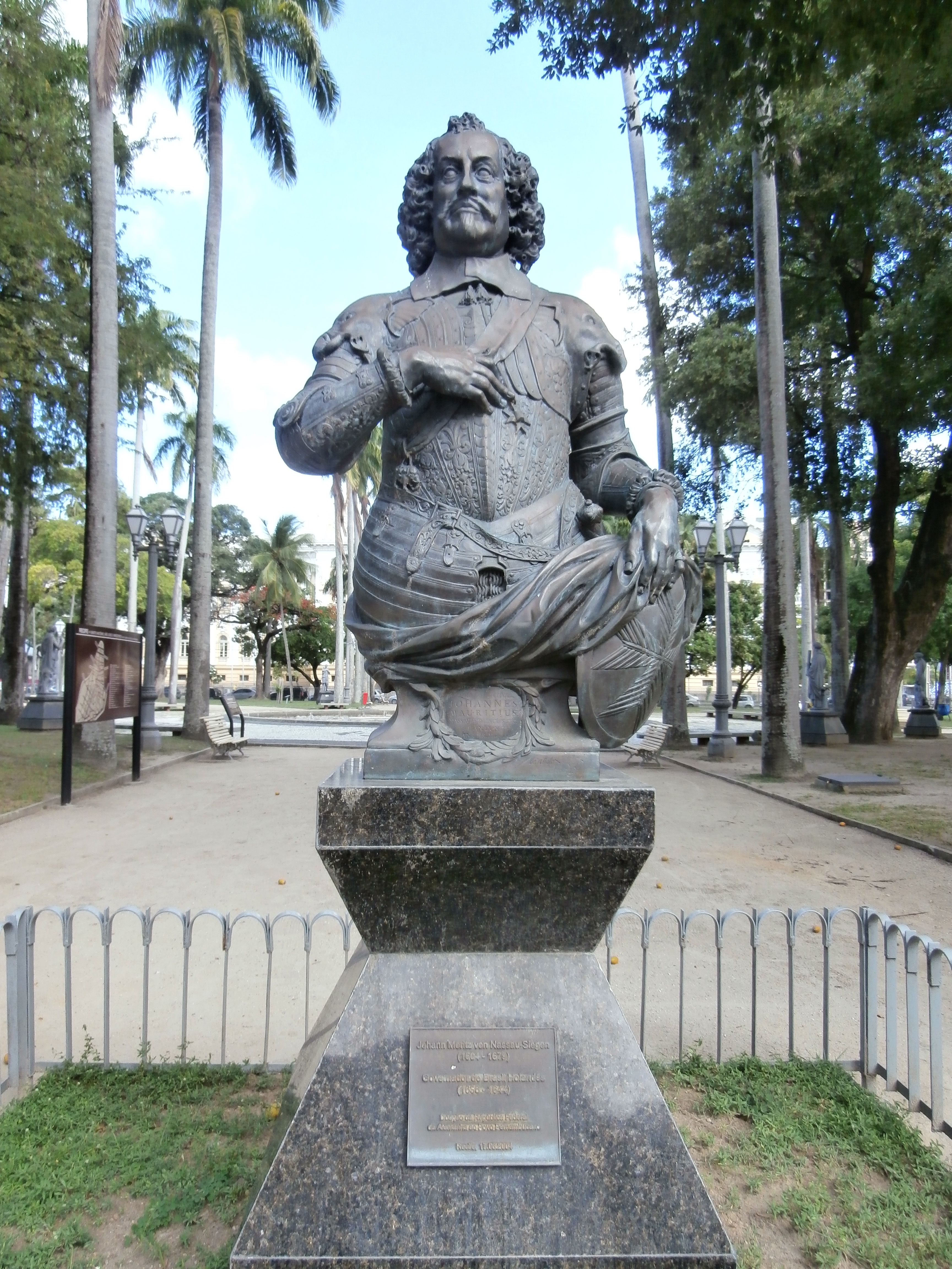 Maurício de Nassau